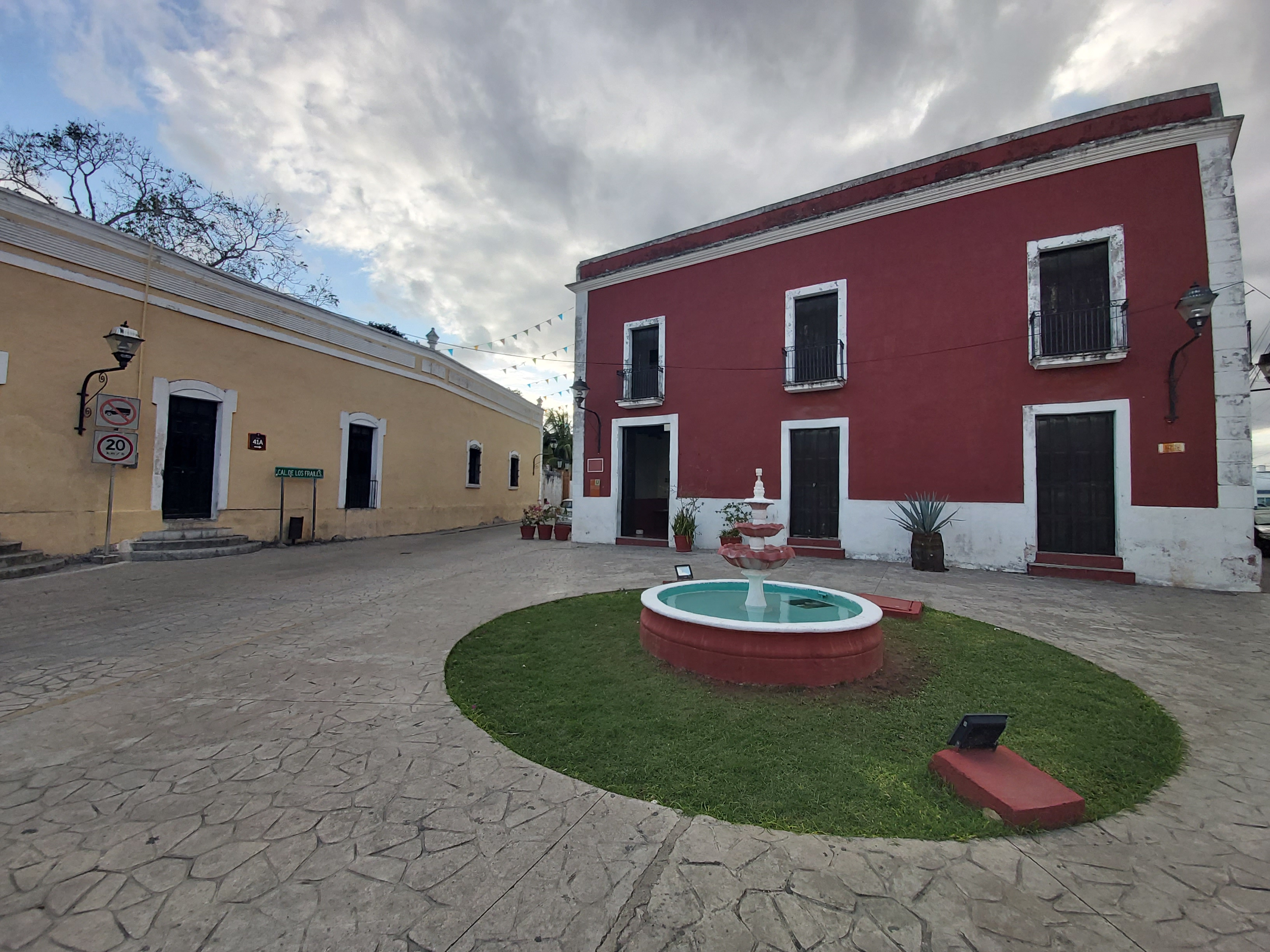 Plaza de Las Cinco Calles, junto a la Calzada de los frailes, Valladolid, Yucatàn